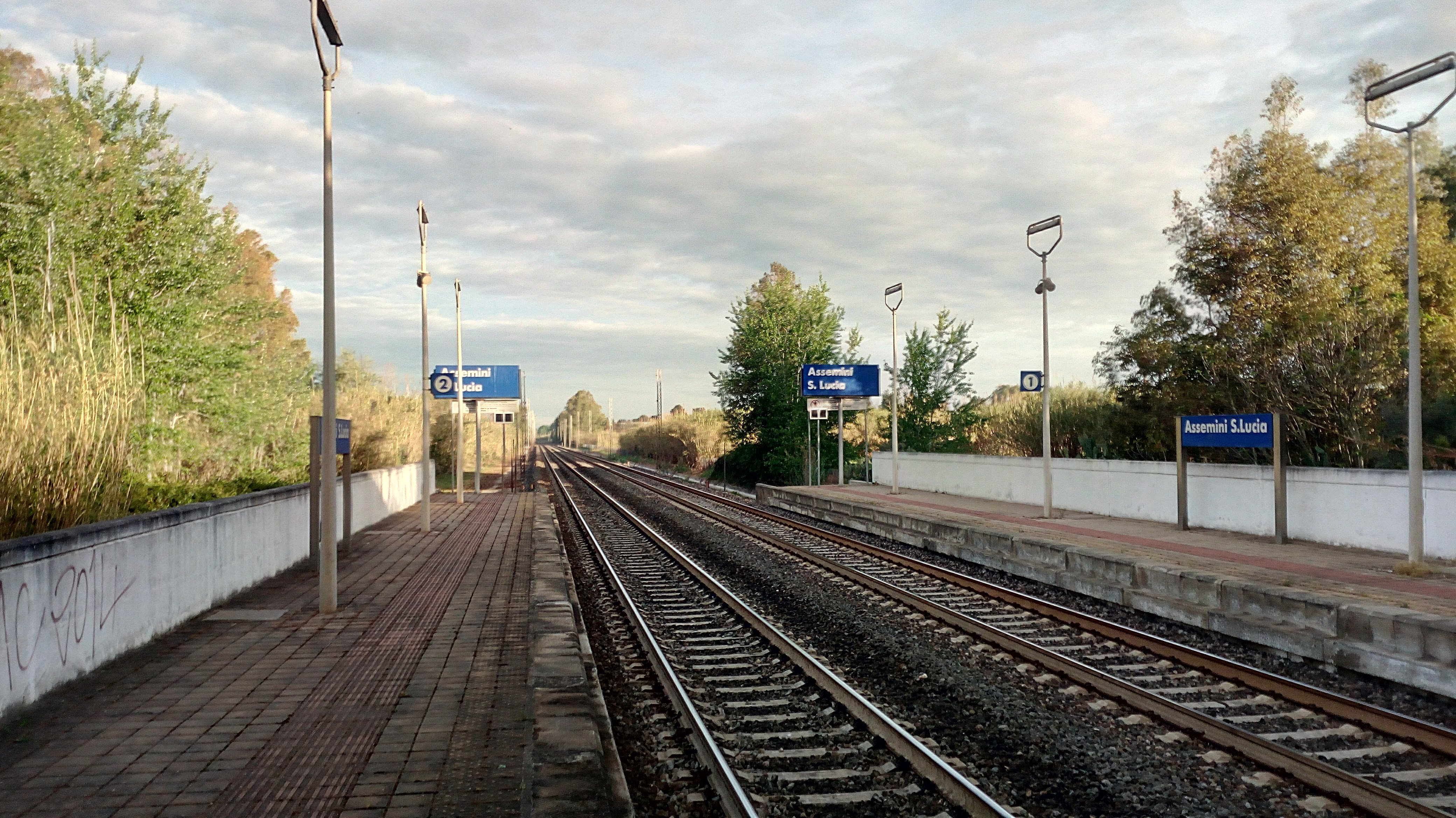 Vista verso Nord dal binario 2 della stazione ferroviaria di Assemini Santa Lucia.